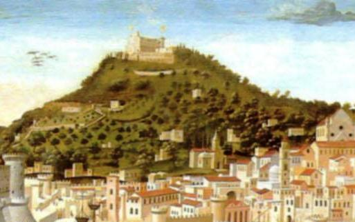 Vomero - Particolare della tavola Strozzi, prima raffigurazione di Napoli, 1474.